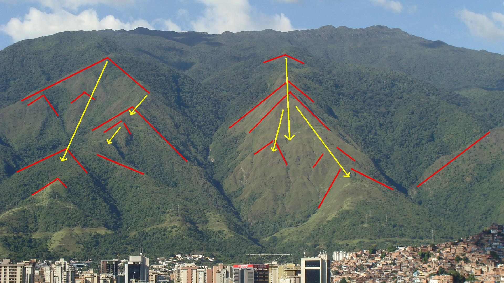 Facetas triangulares en la parte suroccidental de la Serranía del Ávila (Caracas). Puede verse el macizo del pico Naiguatá